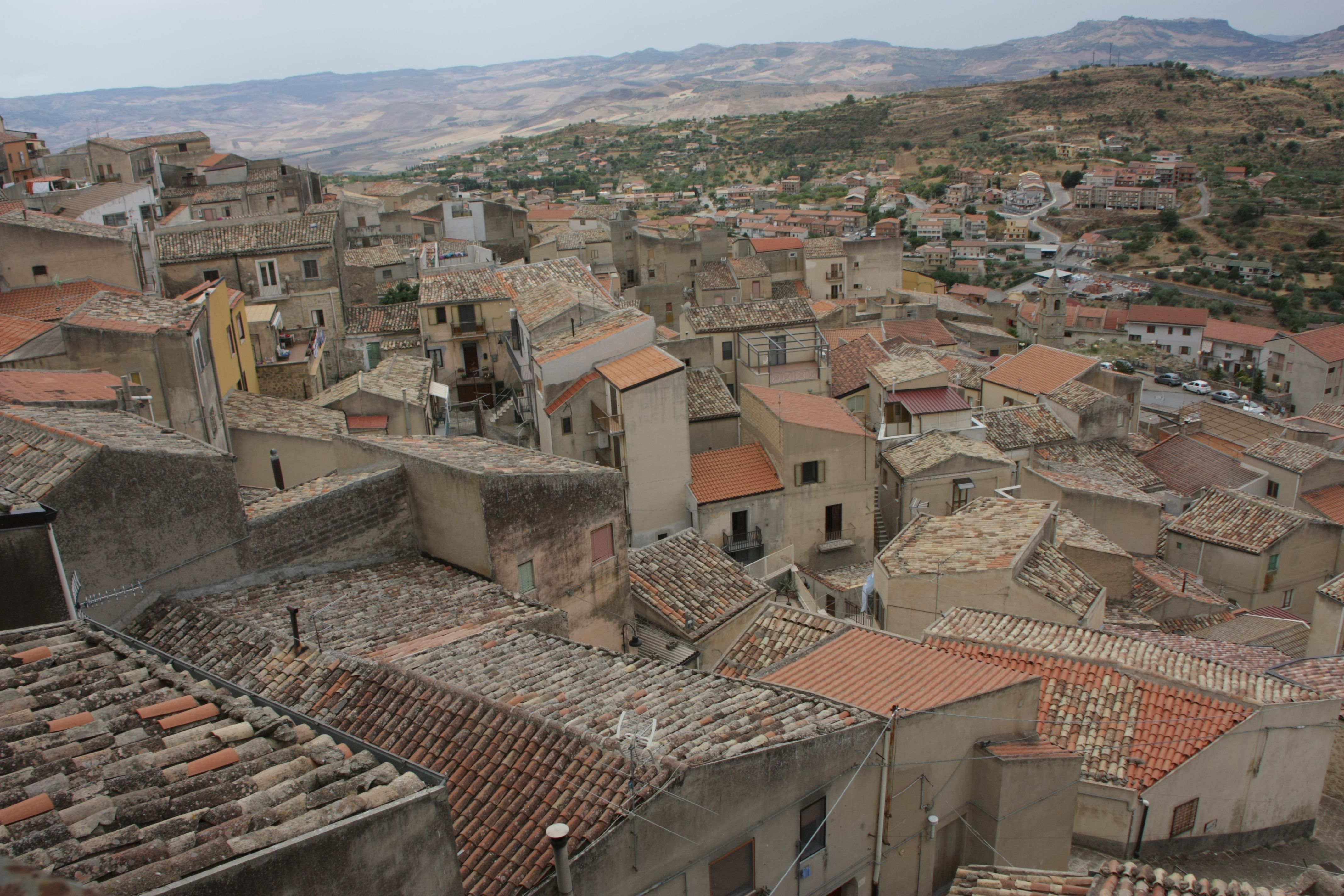 Panorama di Assoro